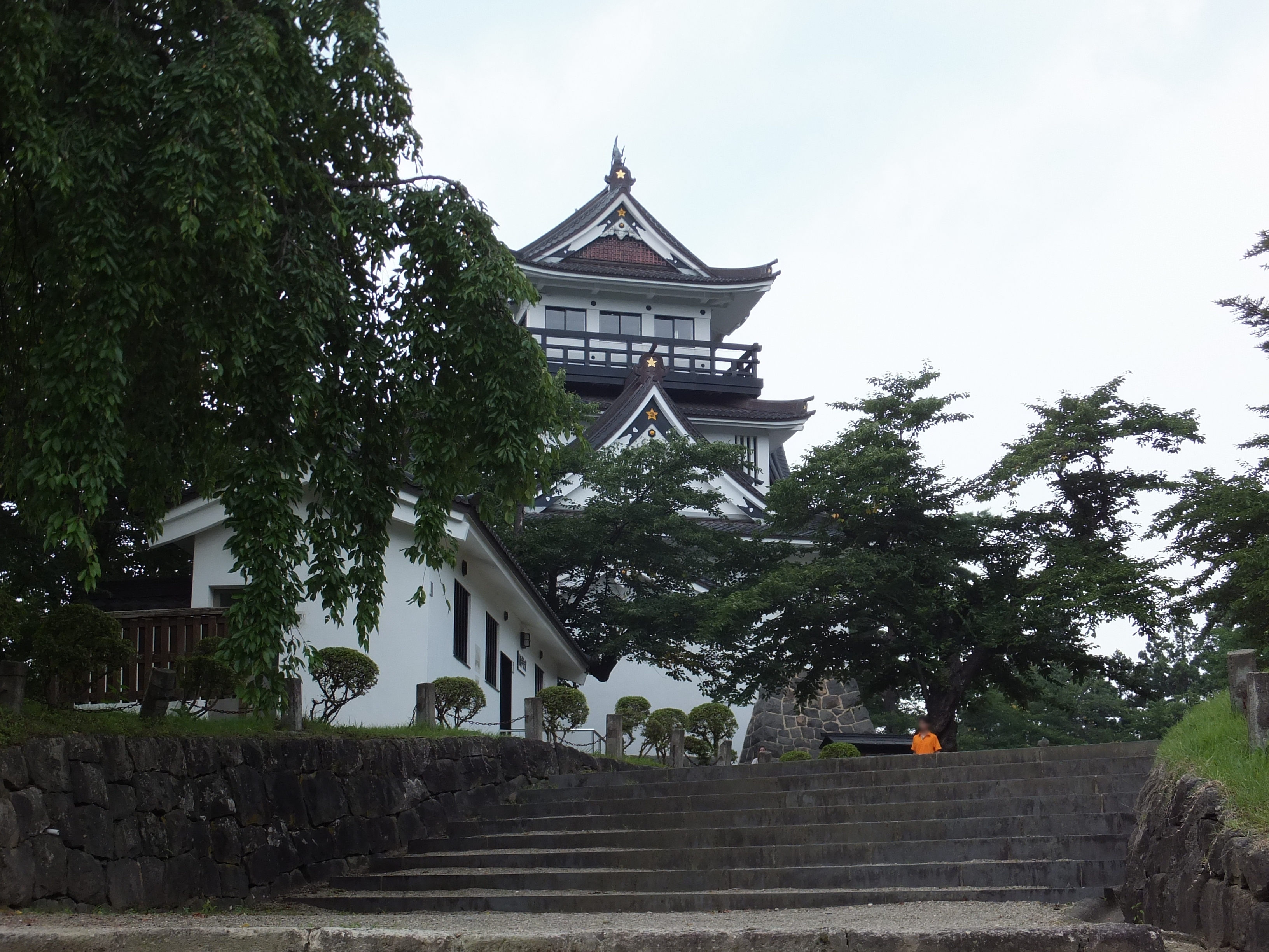 横手城模擬天守。内部は郷土資料館となっている。